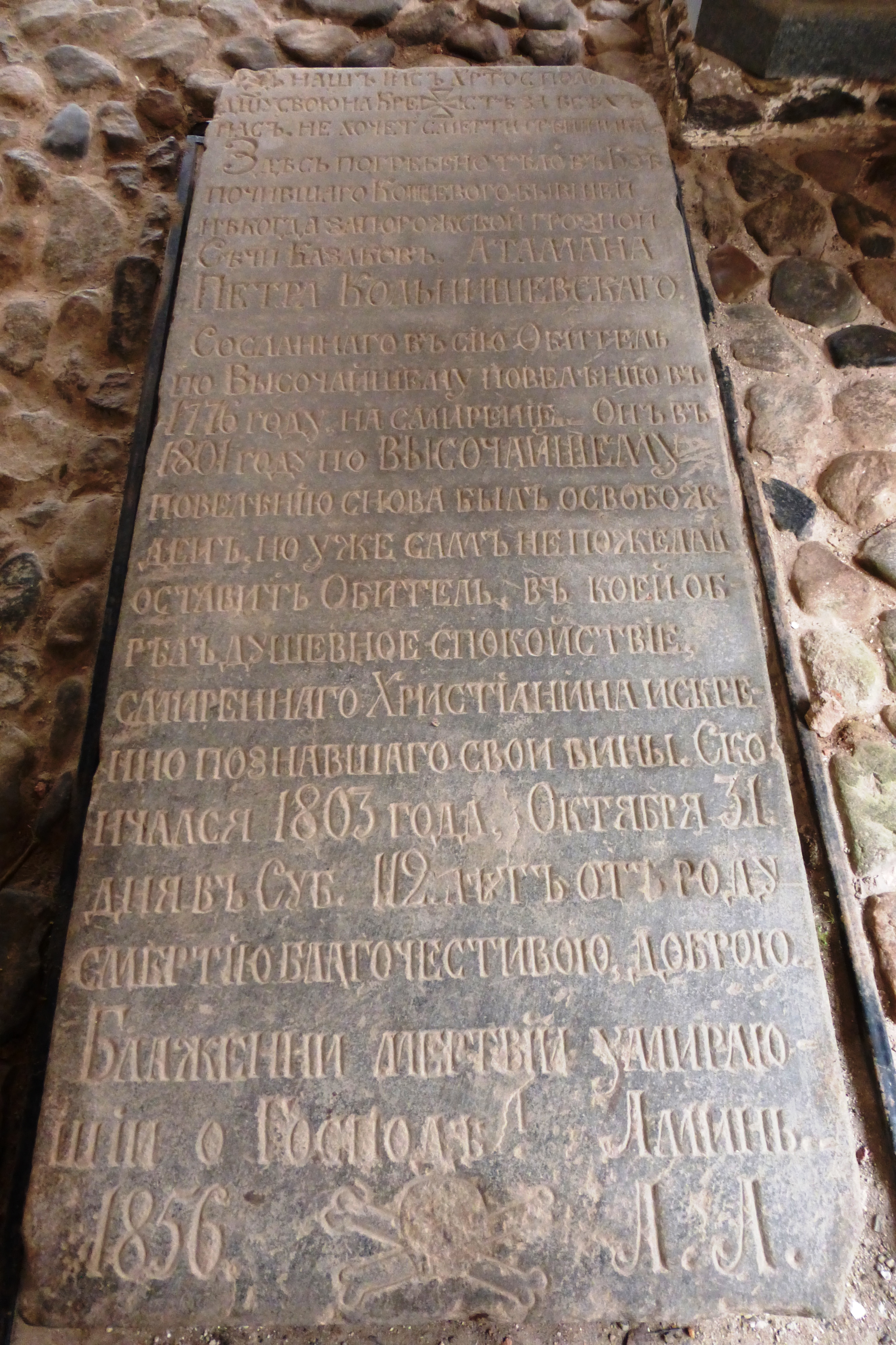 Могила Петра Колнышевского в Соловецком монастыре